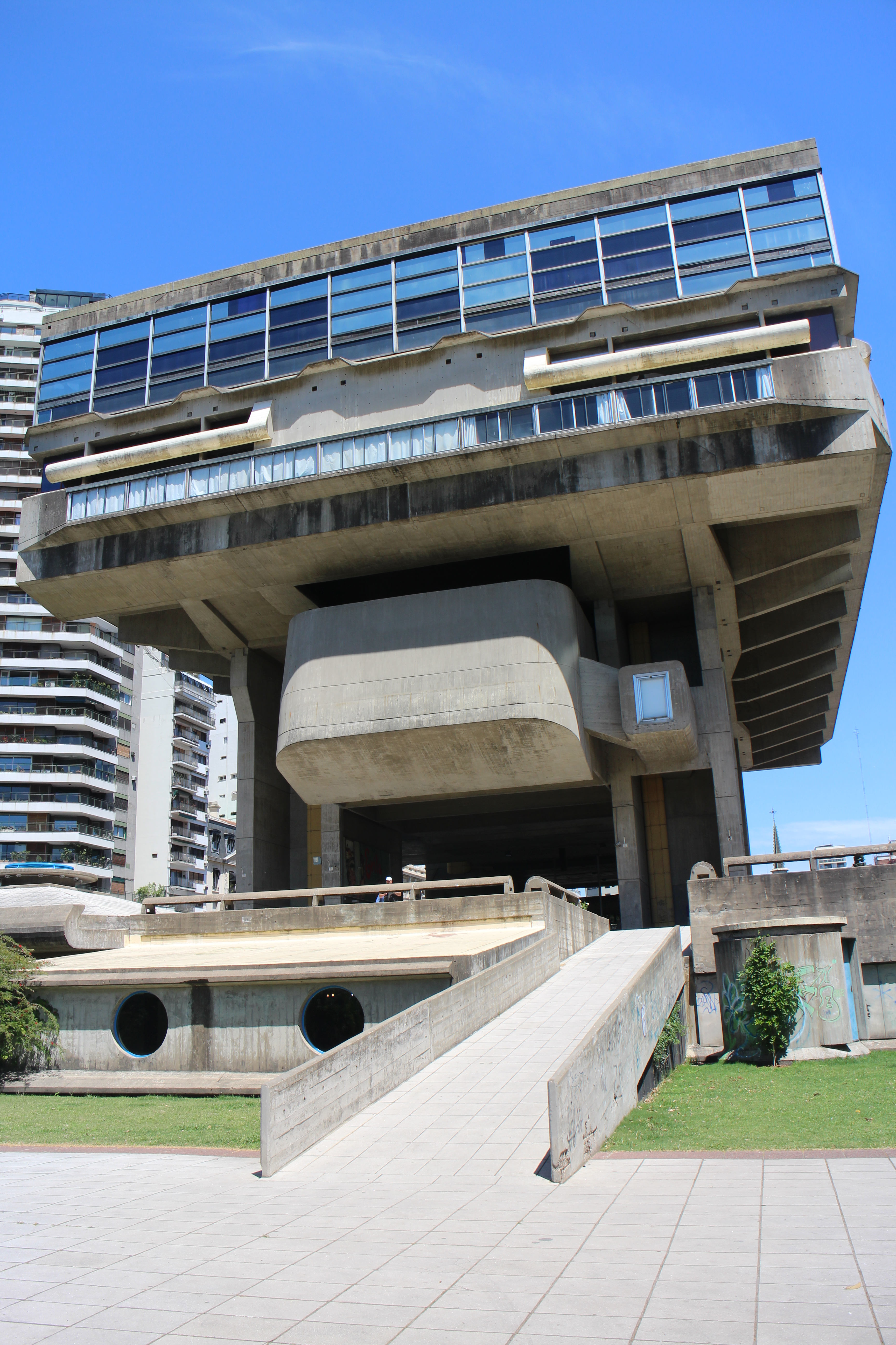 Biblioteca Nacional de la República Argentina, Recoleta, Ciudad Autónoma de Buenos Aires.